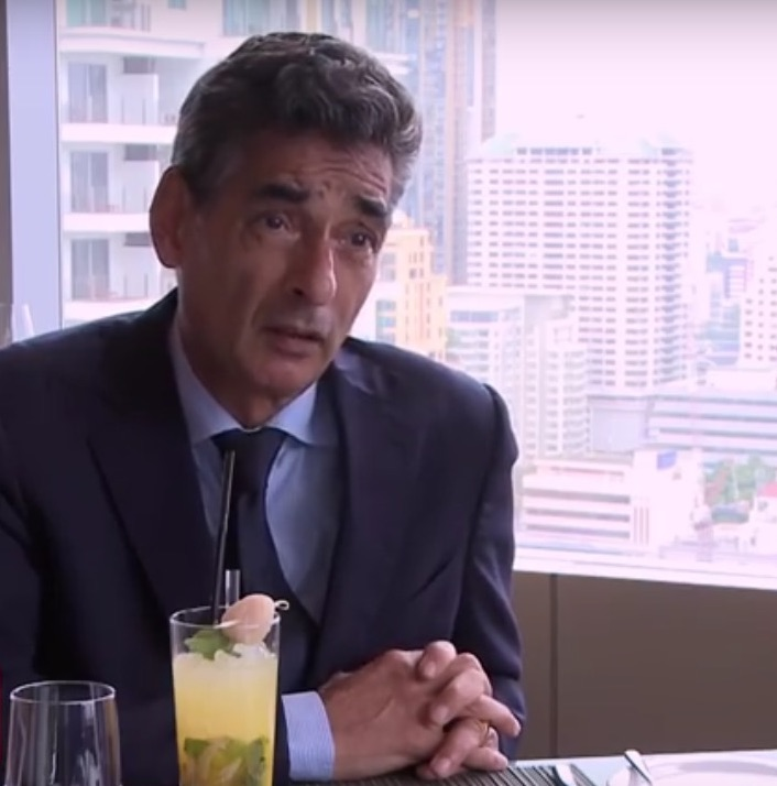 Spong in een interview over een client bij omroep Brabant..